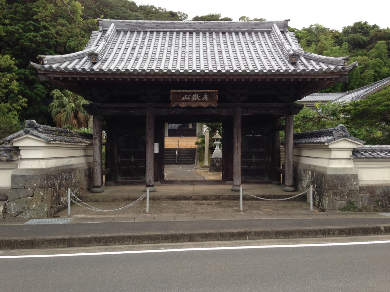 長崎県五島市-大円寺